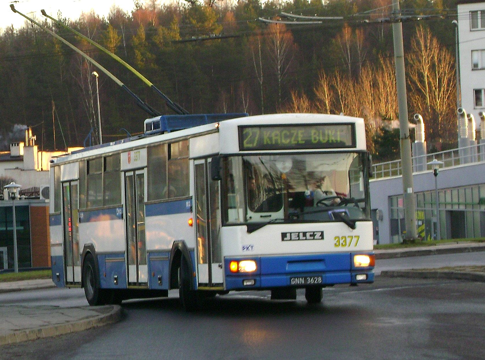 Trolejbus Jelcz 120MT z Gdyni.